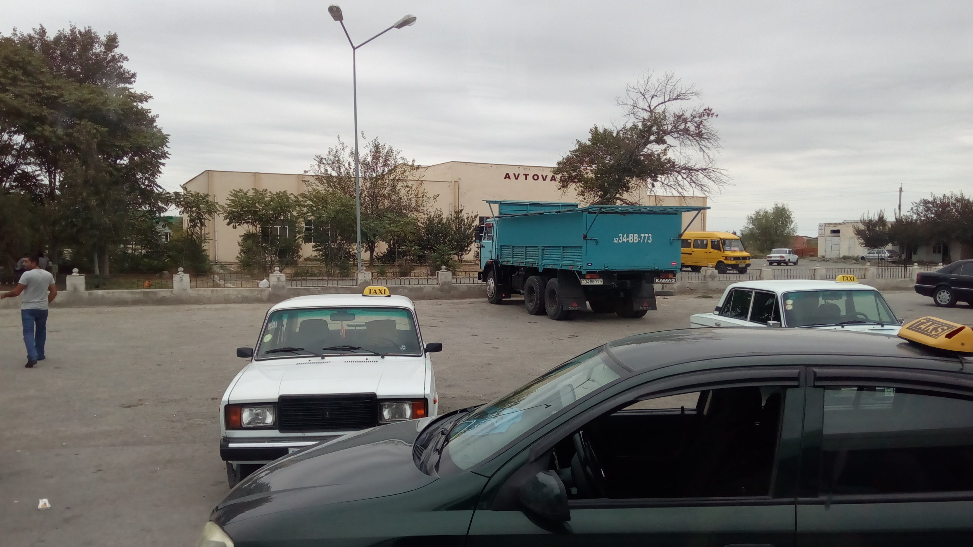 Zərdab Avtovağzalı